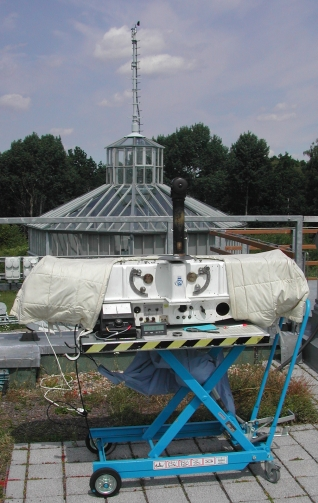 Dobson-Spectrophotometer D071 auf dem Dach des Strahlungslabors des Meteorologischen Observatorium Lindenberg